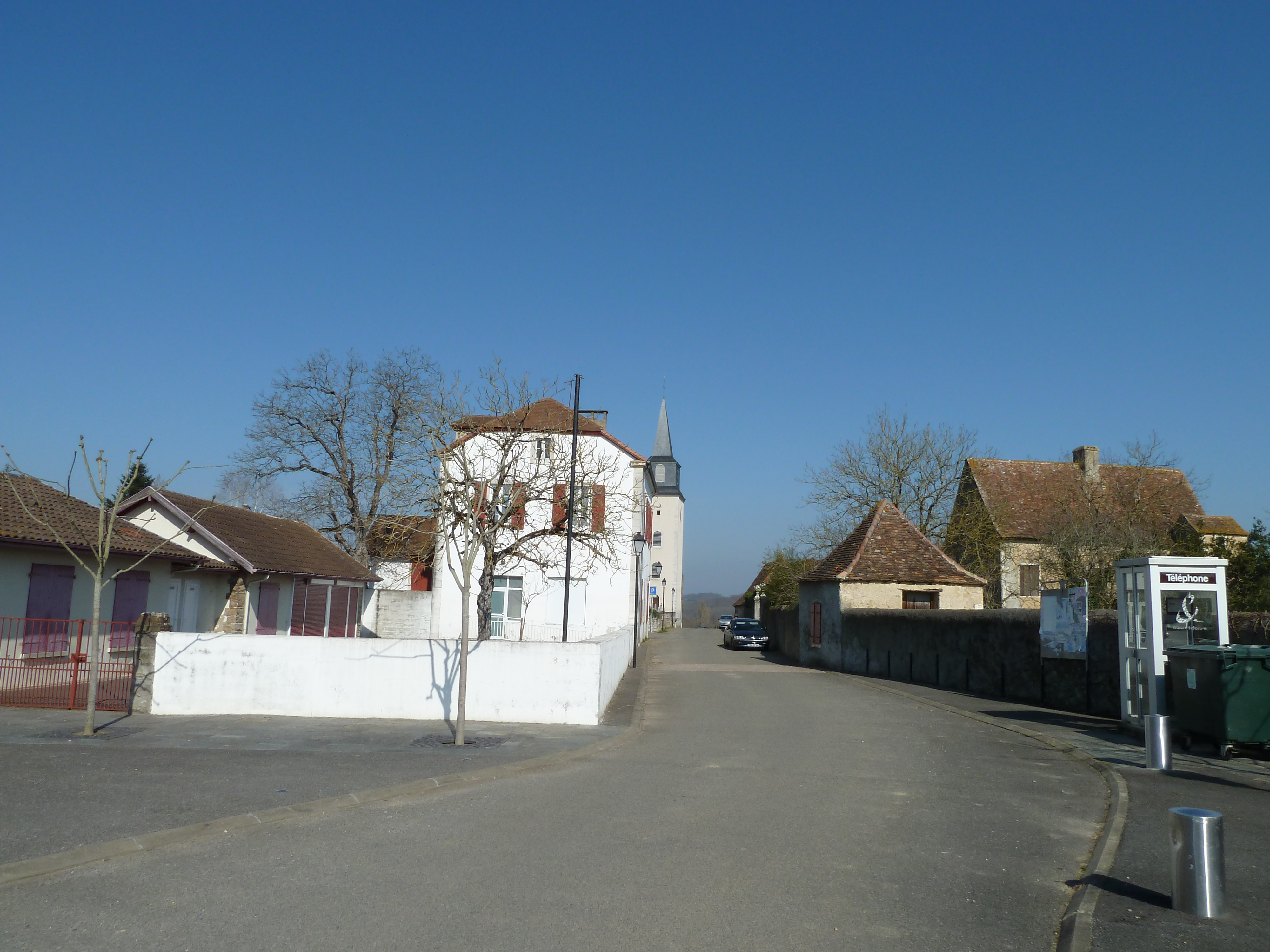 Centre de Loubieng